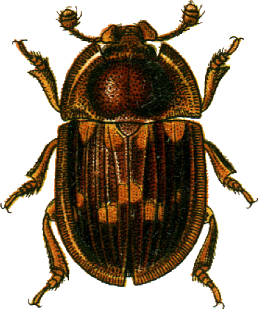 This file has been extracted from another file: Jacobs18.jpg